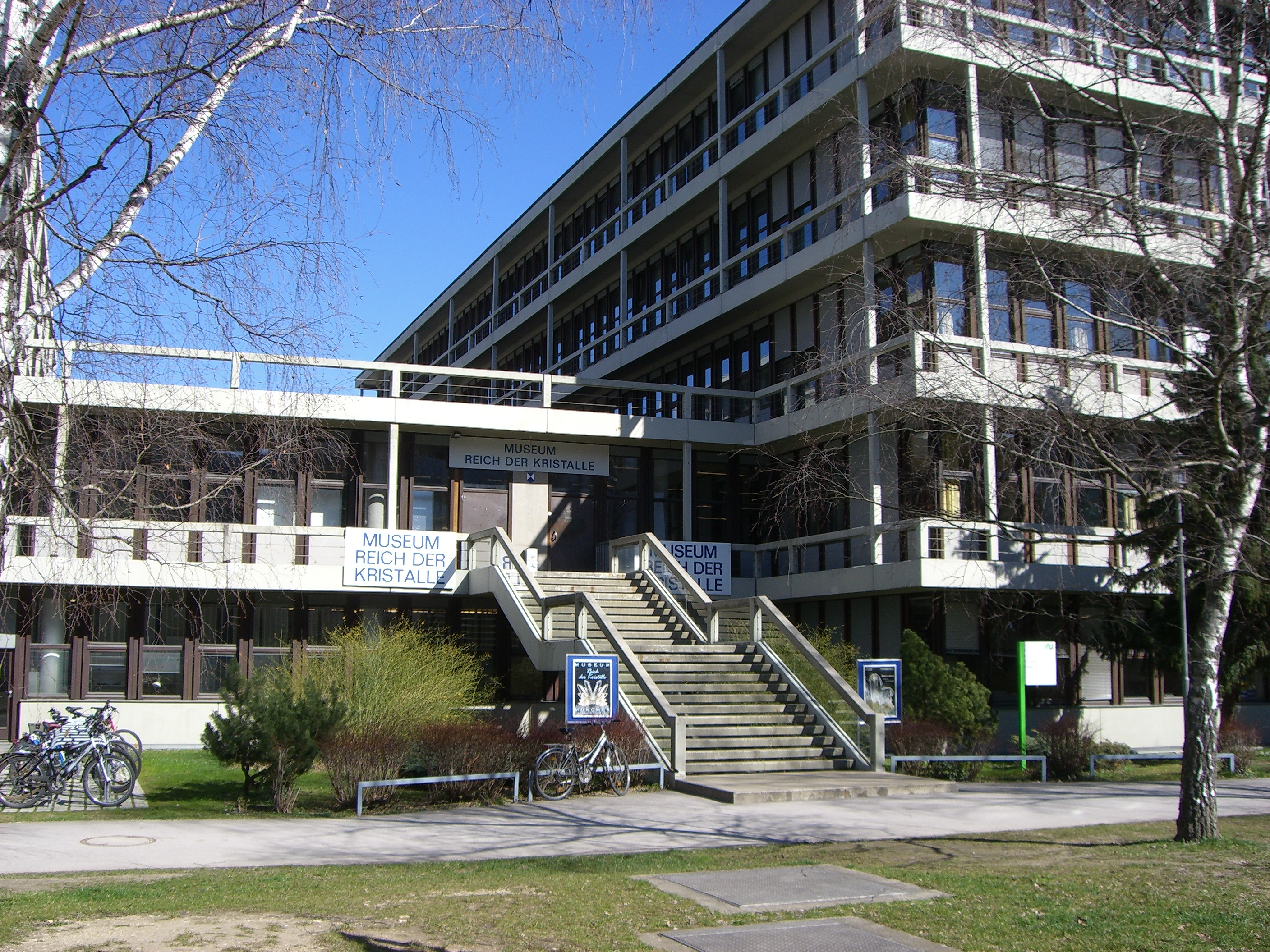 München, Museum Reich der Kristalle (Eingang)